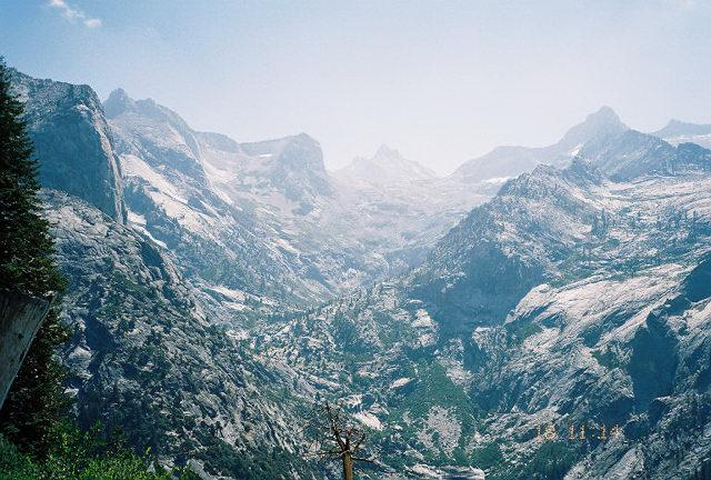 Kaweah Gap in Sequoia National Park